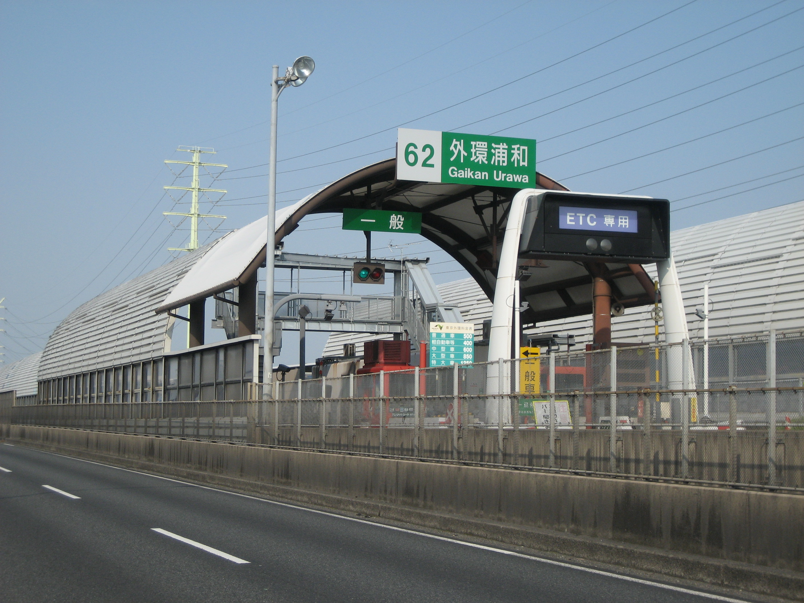 東京外環自動車道外環浦和IC料金所